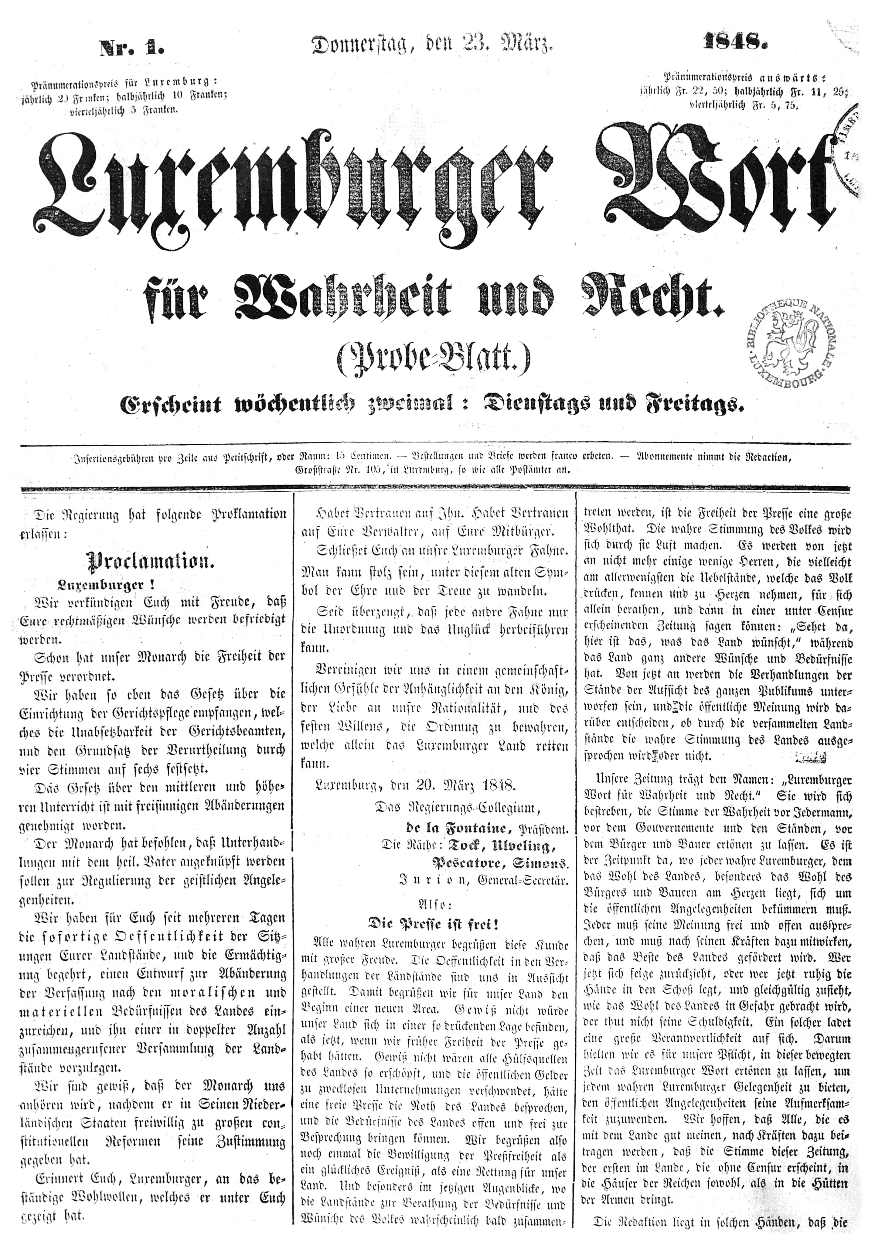 Titelsäit vun der éischter Nummer vum Luxemburger Wort vum 23. Mäerz 1848.